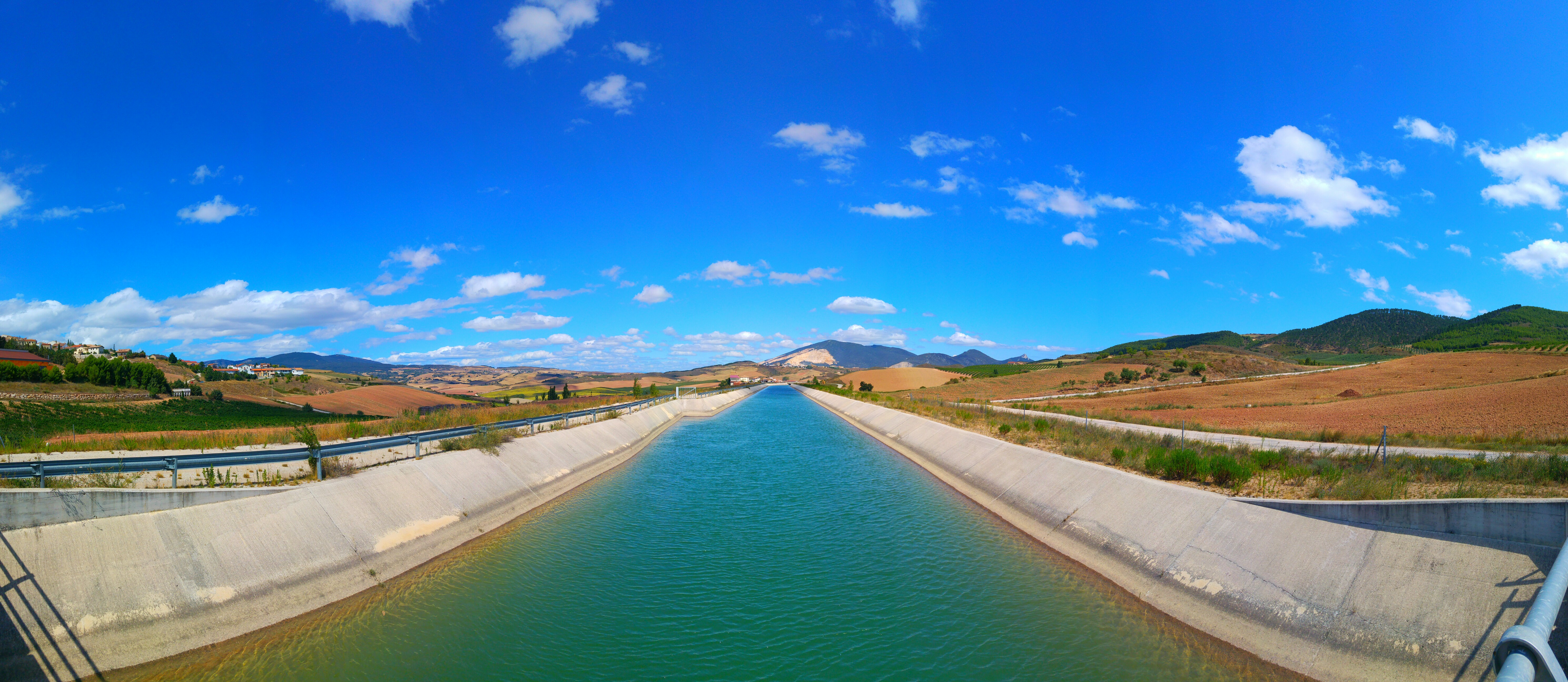 Canal de Navarra en Pitillas